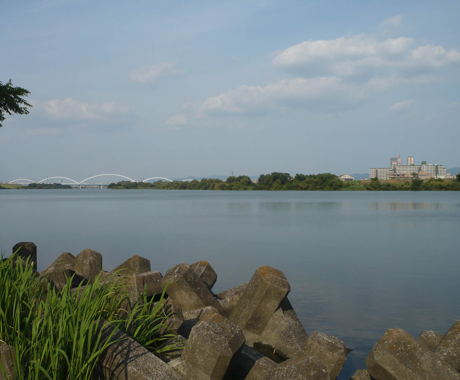 淀川